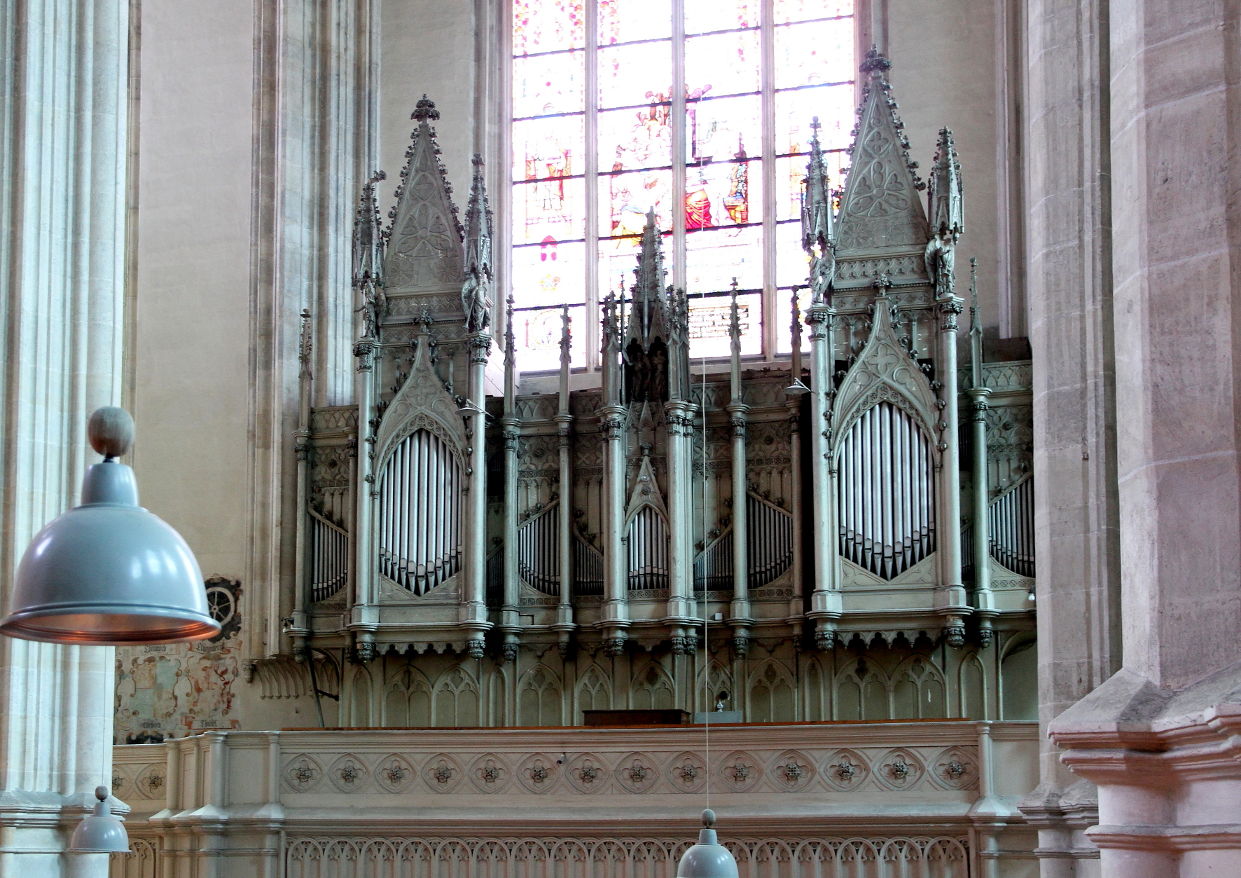 Orgel der Wiener Minoritenkirche. Ein Werk aus dem Jahr 1786 von Franz Xaver Christoph mit 20 Register, verteilt auf zwei Manuale und Pedal. Das neugotische Gehäuse wurde nach Plänen des kaiserlichen Hofarchitekten Johann Ferdinand Hetzendorf von Hohenberg angefertigt.